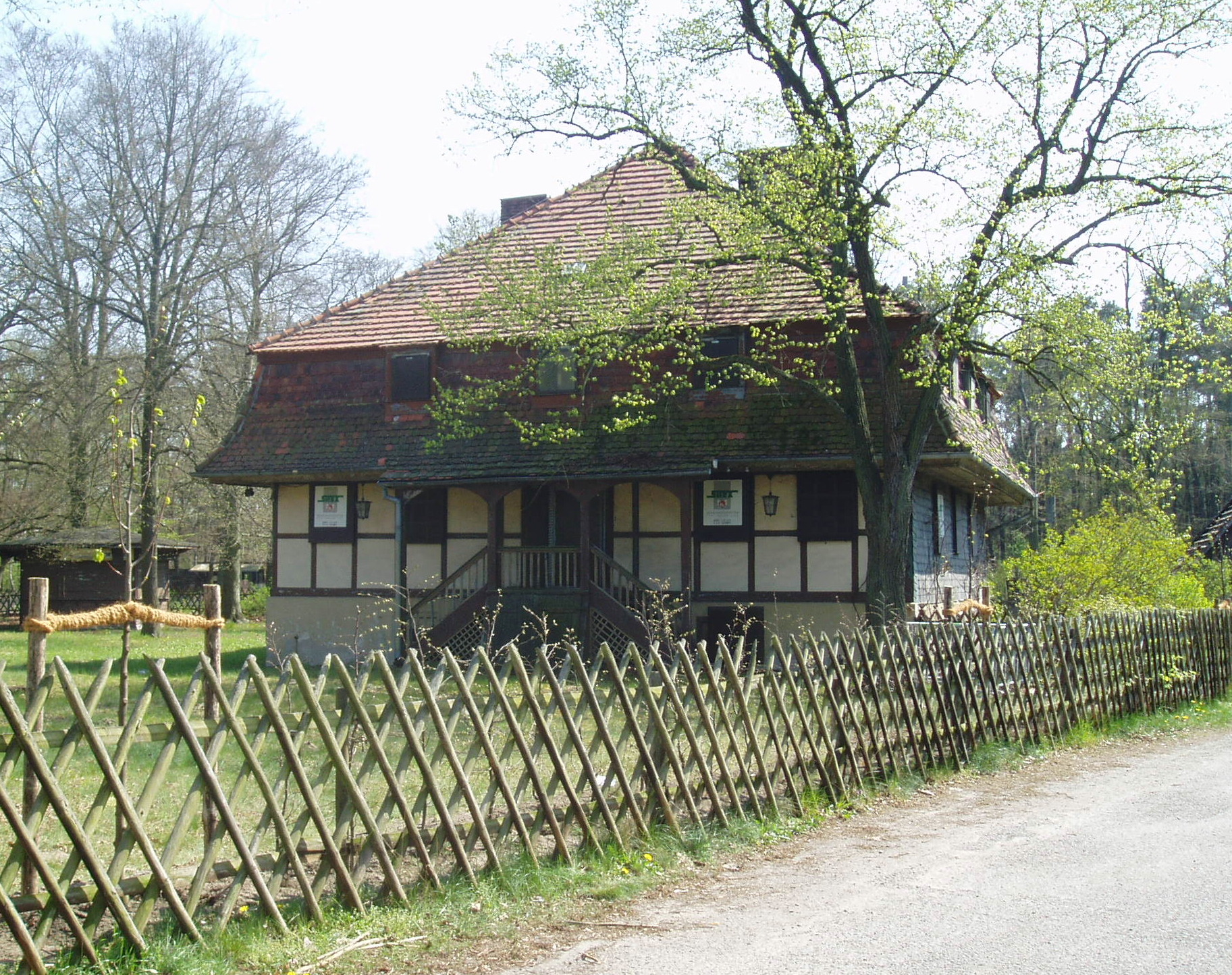 Kastellanhaus am Jagdschloss Stern, Potsdam